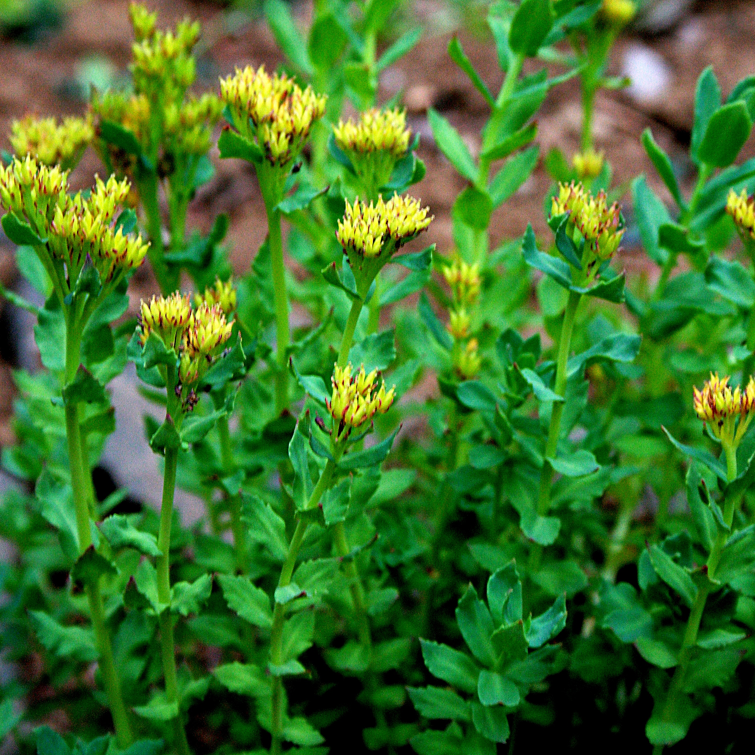 Ísland, Akureyri Botanical Gardens: Rhodiola_angusta